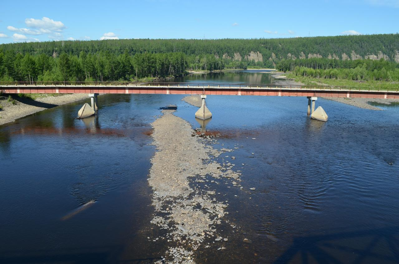 Река Чульман и автомобильный мост на притрассовой автодороге с ж/д моста (южного) через р. Чульман близ посёлка Чульман, Нерюнгринский район, Якутия